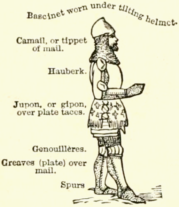 Mary Eliza Haweis (1848-1898), Chaucer for children, 1877.